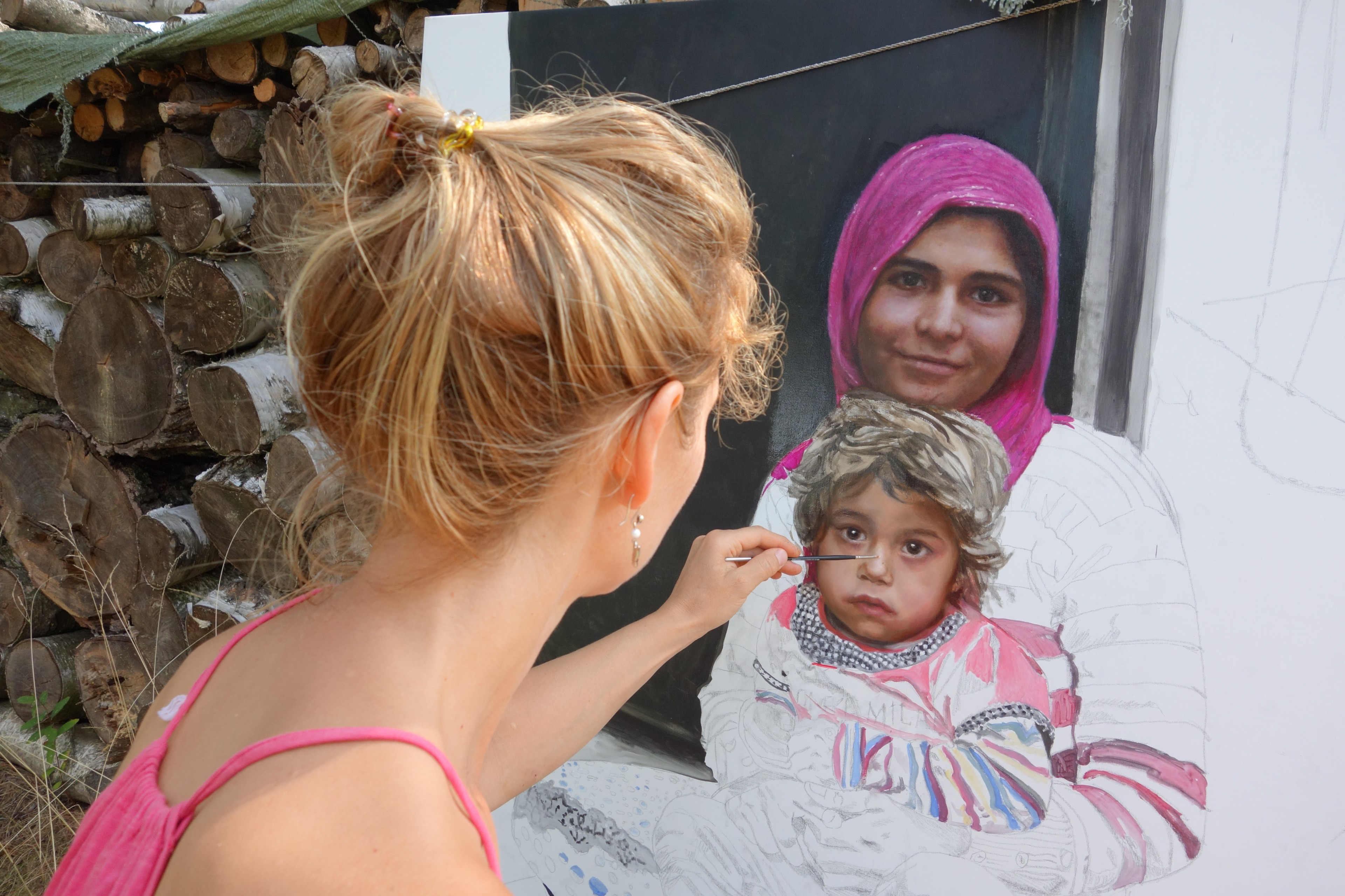 Dagmar Junek Hamsíková maluje v přírodním atelieru